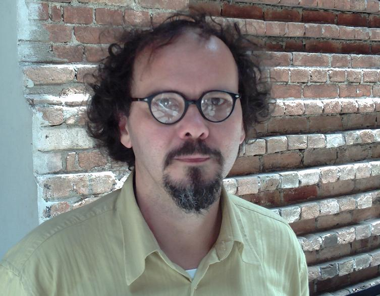 Retrato de Flo Menezes, fotografado na Pinacoteca de São Paulo